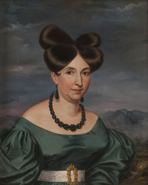 Paula Jaraquemada Alquizar: uno de los personajes femeninos más importantes en la lucha por la independencia de Chile.